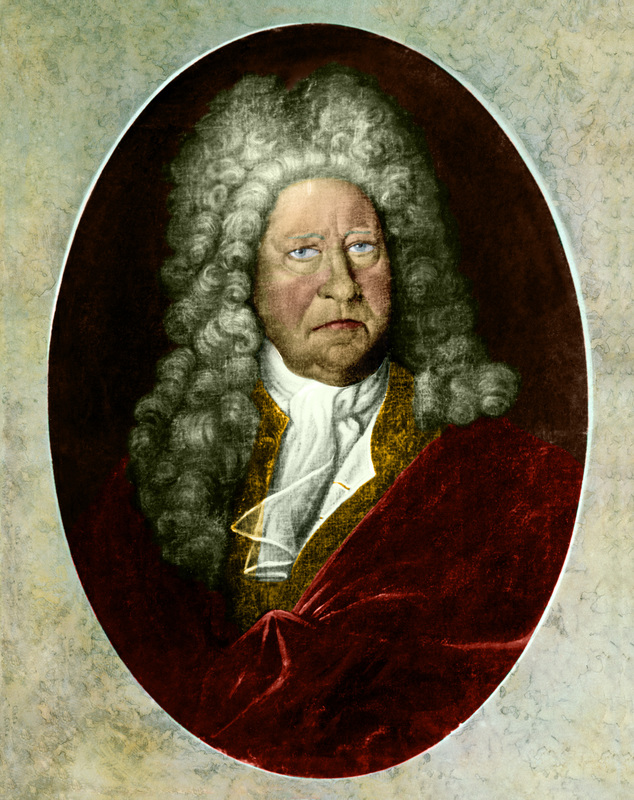 Georg Ludwig von Wurmb (1643-1721)